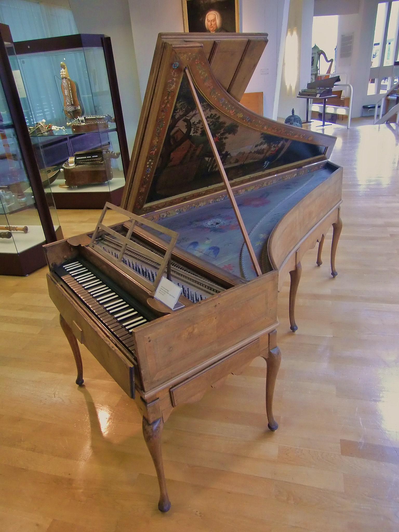 Combiné Clavecin-piano attribué à Johann Ludwig Hellen (Berne, avant 1779) - Berlin, Musikinstrumentenmuseum